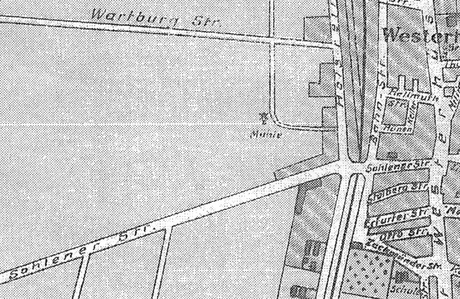 Ortsplan von Westerhüsen mit der Böckelmannschen Windmühle aus der Zeit kurz nach der Eingemeindung 1910